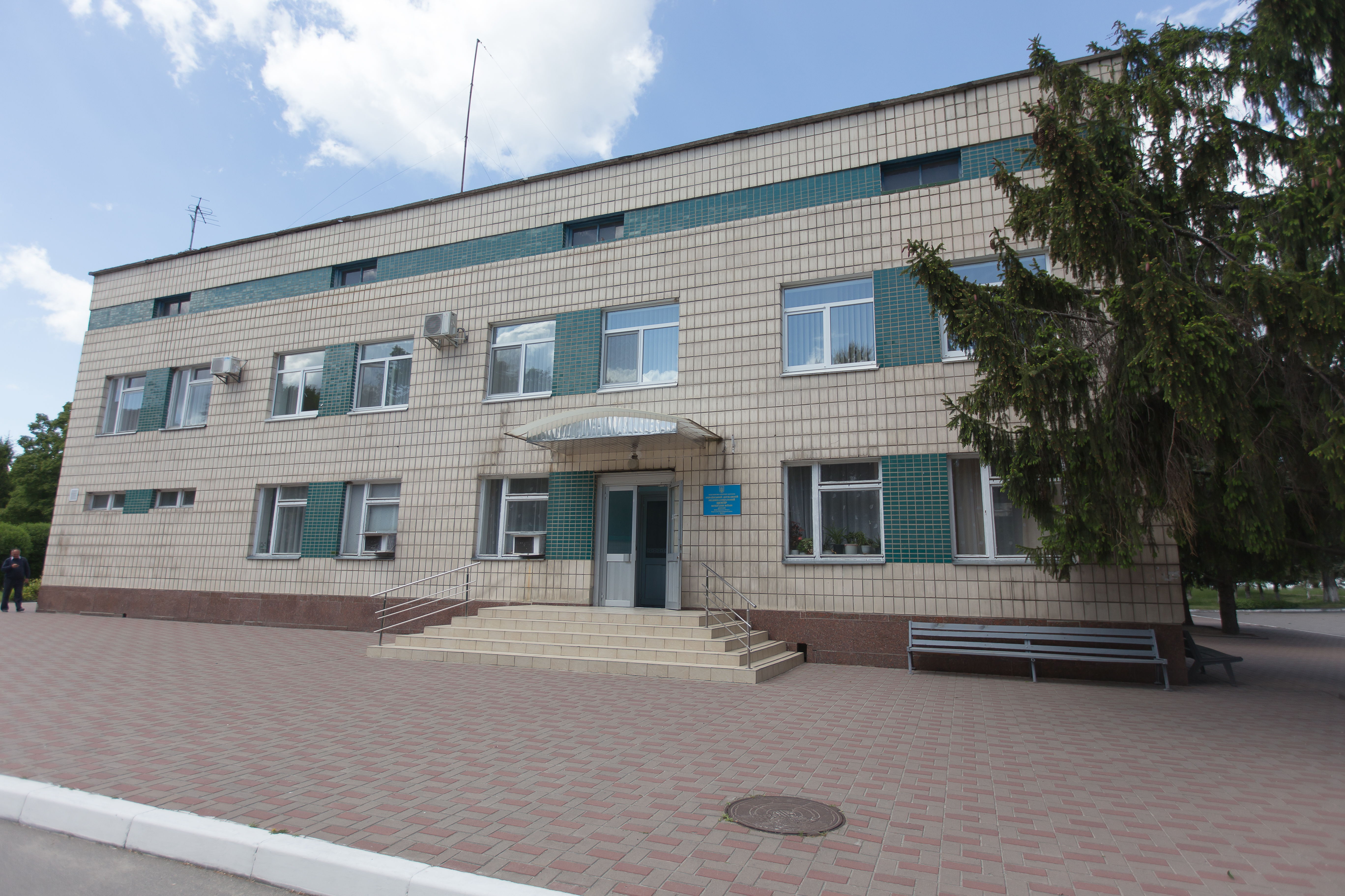 Украінський Державний Медико-соціальний ветеранів війни. с.Циблі-1. Переяслав-Хмельницький район. Киівська область.-2